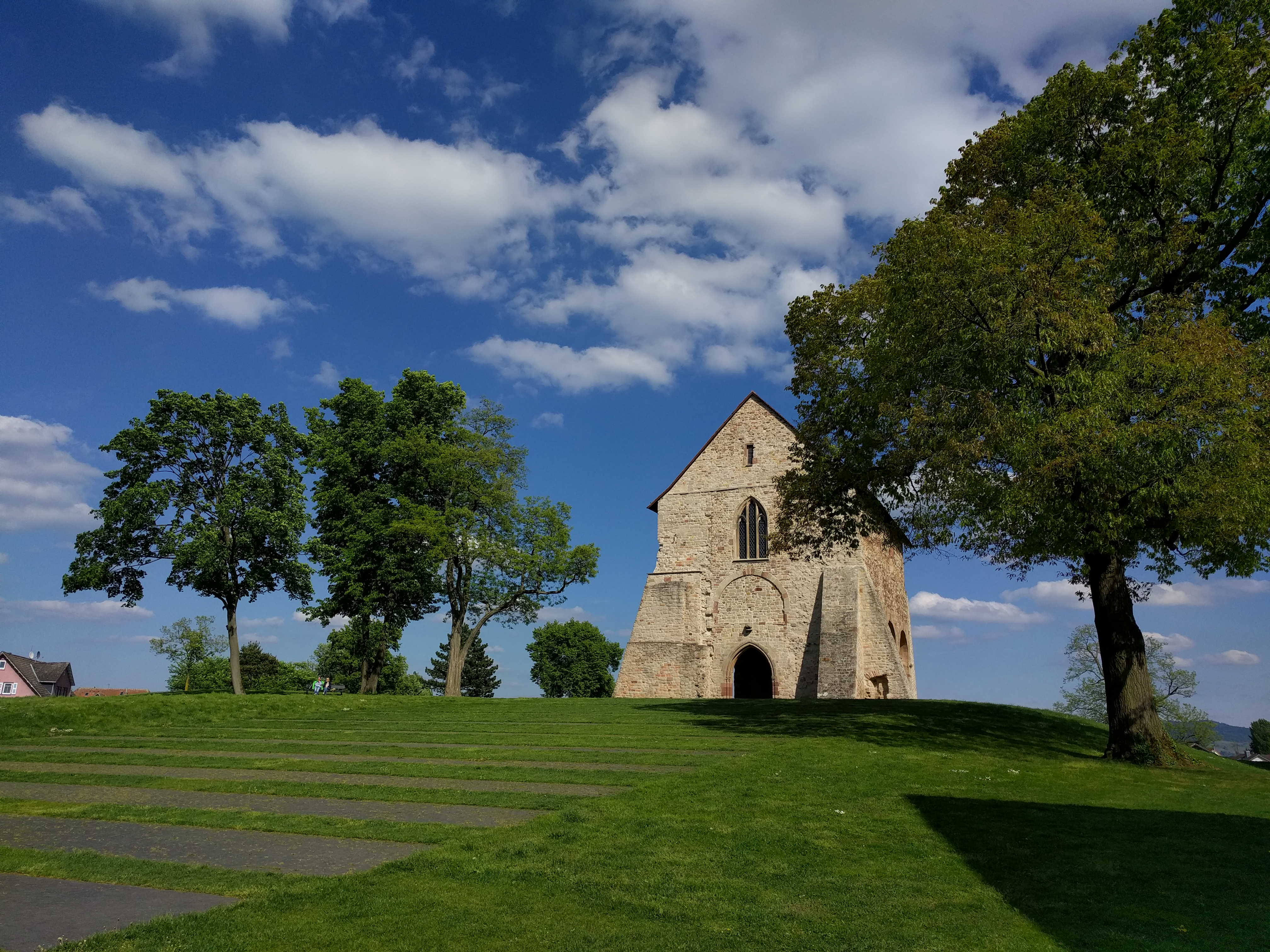 Fragment der Klosterkirche, Kloster Lorsch